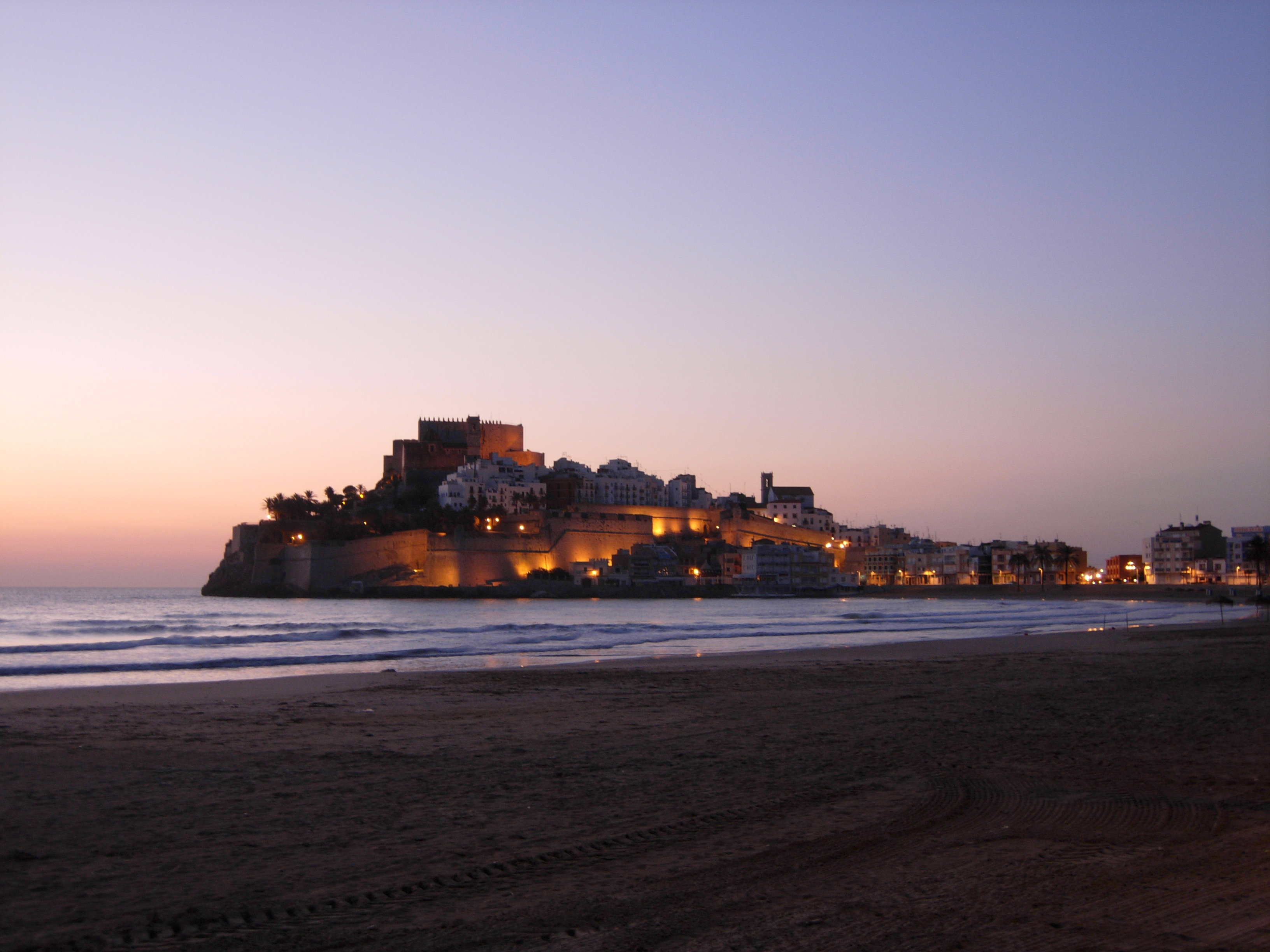 Peñiscola au lever du jour.